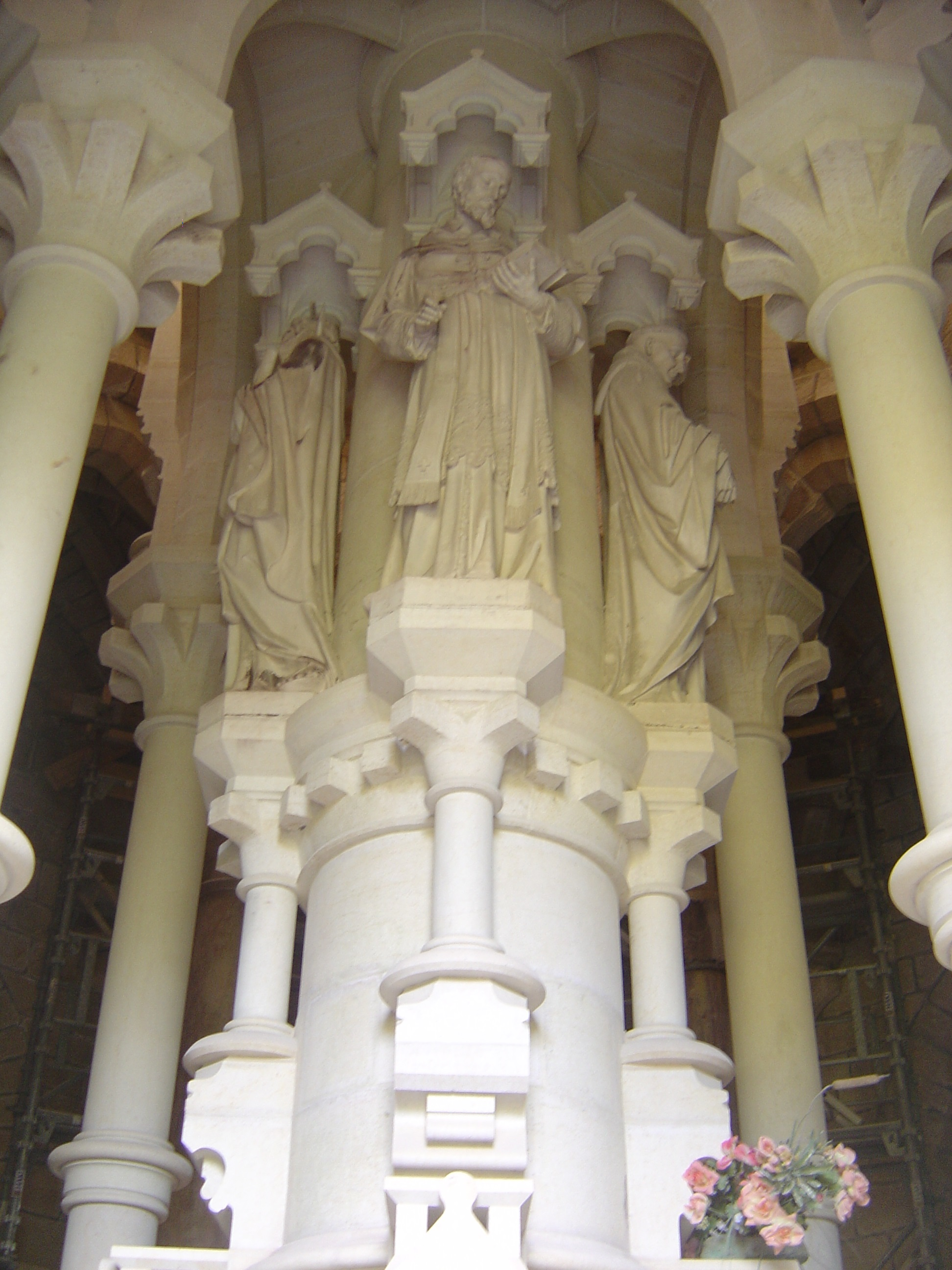 A l'intérieur de la chapelle Notre-Dame d'Etang